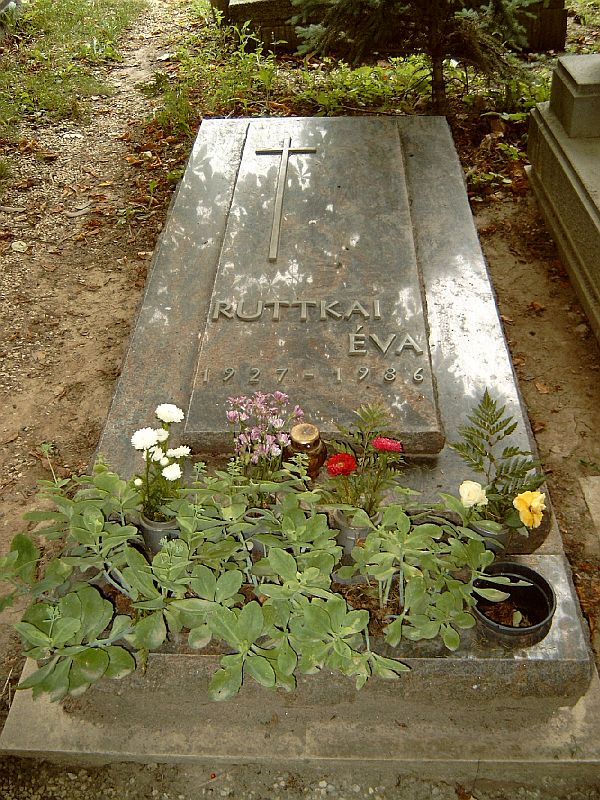 Ruttkai Éva sírja Budapesten. Farkasréti temető: 25-4-41.